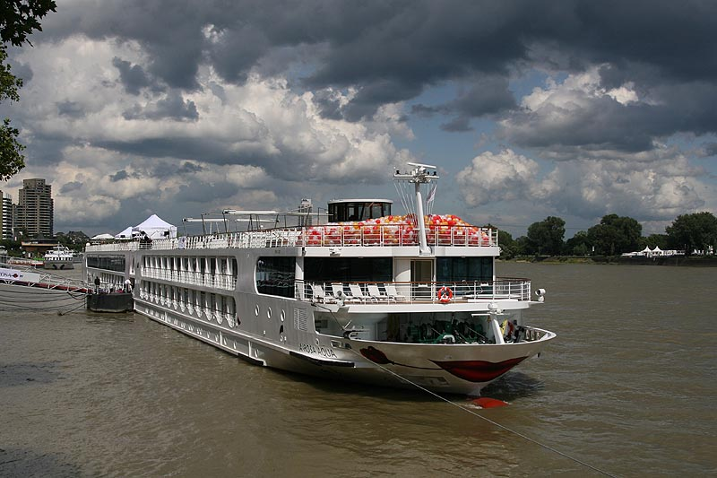 A-ROSA Aqua